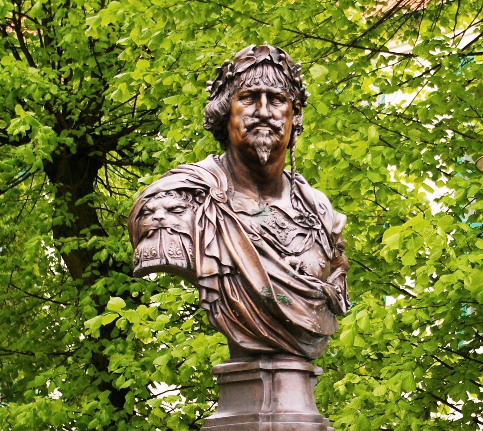 Denkmalbüste: Christian IV. (1577-1648), König von Dänemark und Norwegen (1588-1648). Gründete Glückstadt im Jahr 1617.